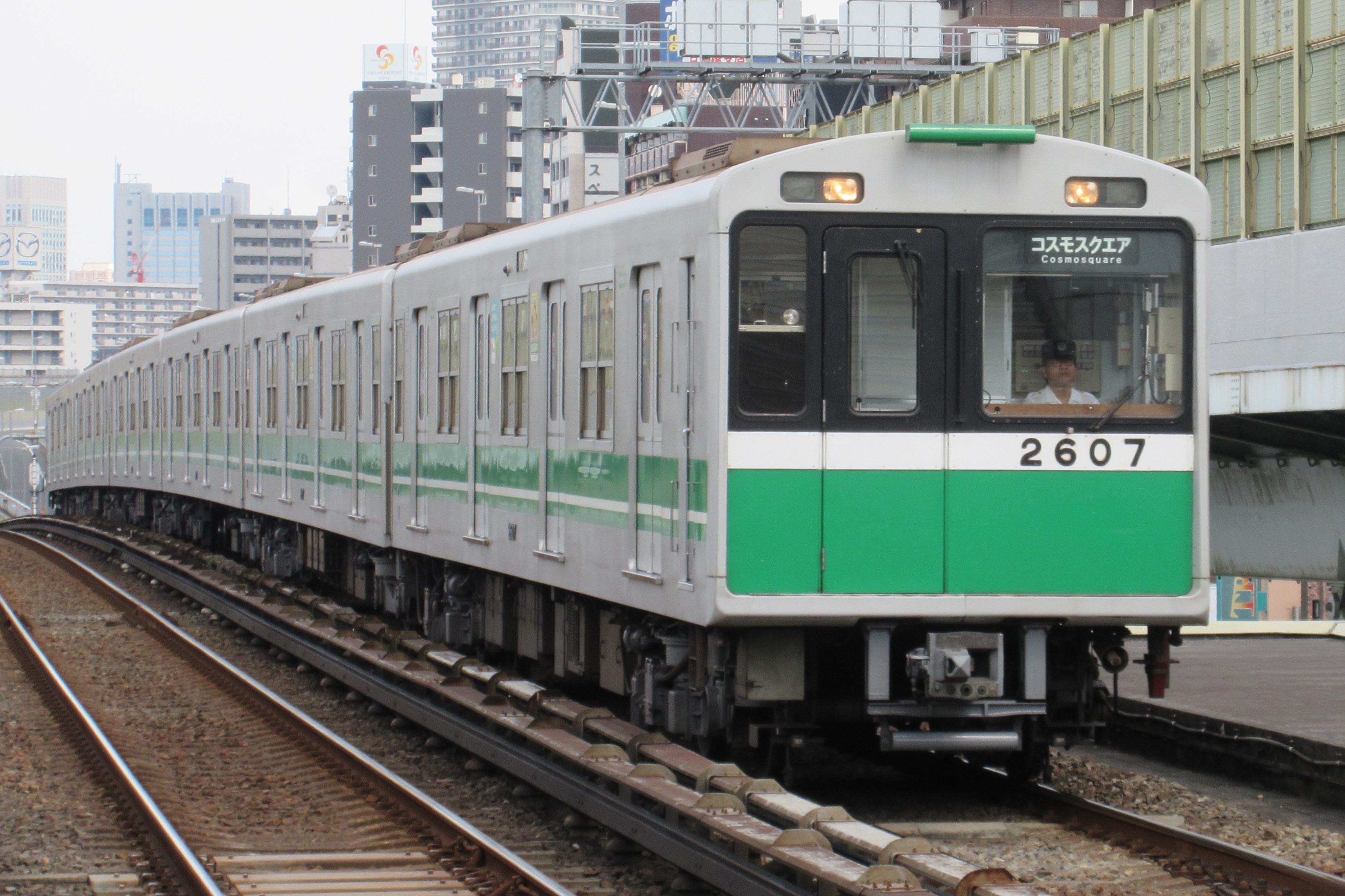 大阪市営地下鉄2607 (九条駅にて)